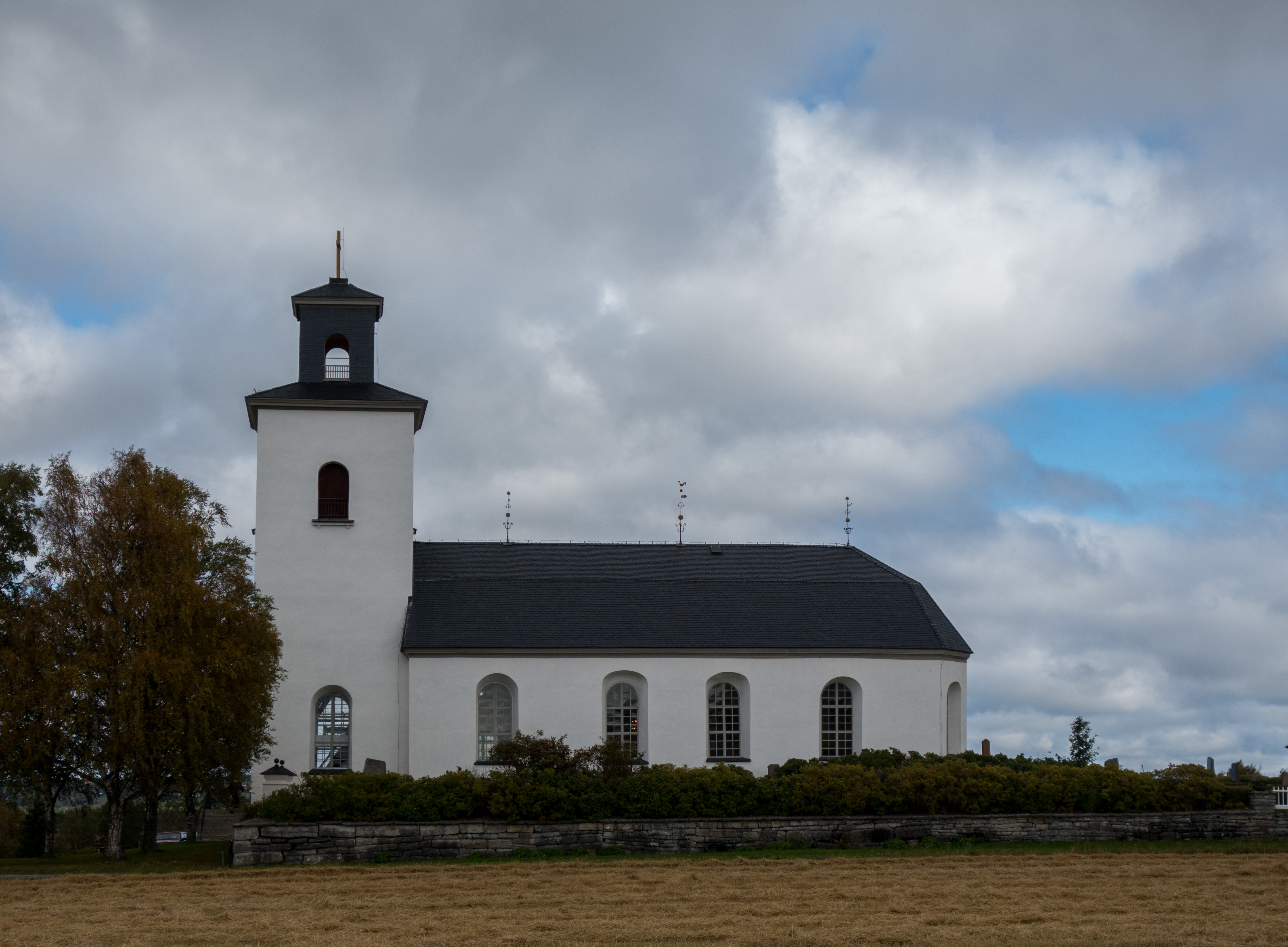 Näs kyrka (Näs prästbord 1:2)